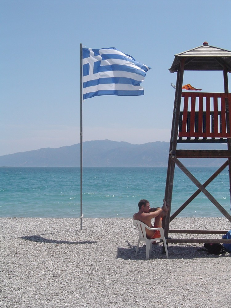 Flagge Griechenlands am Strand von Nafpaktos